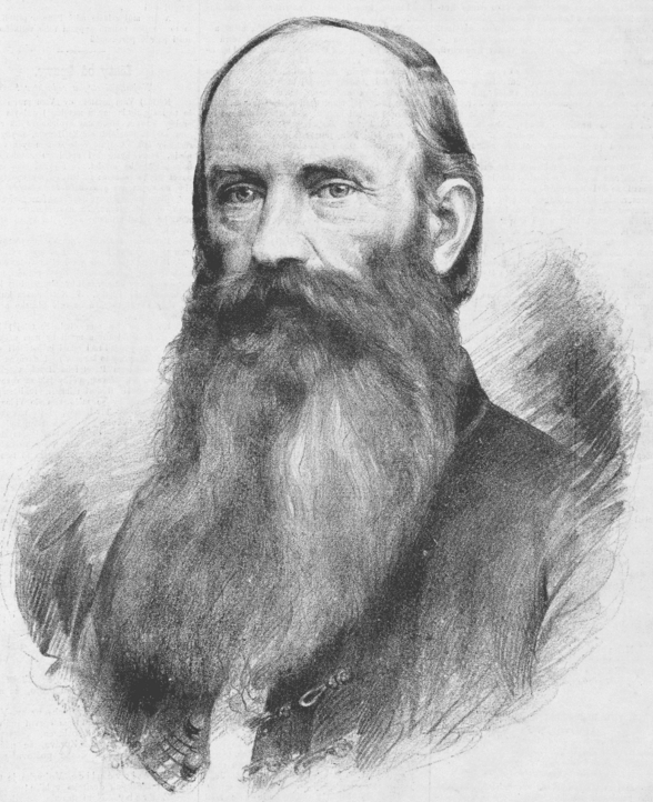 Václav Kratochvíl (1820 - 1893), rolník a regionální politik na Roudnicku